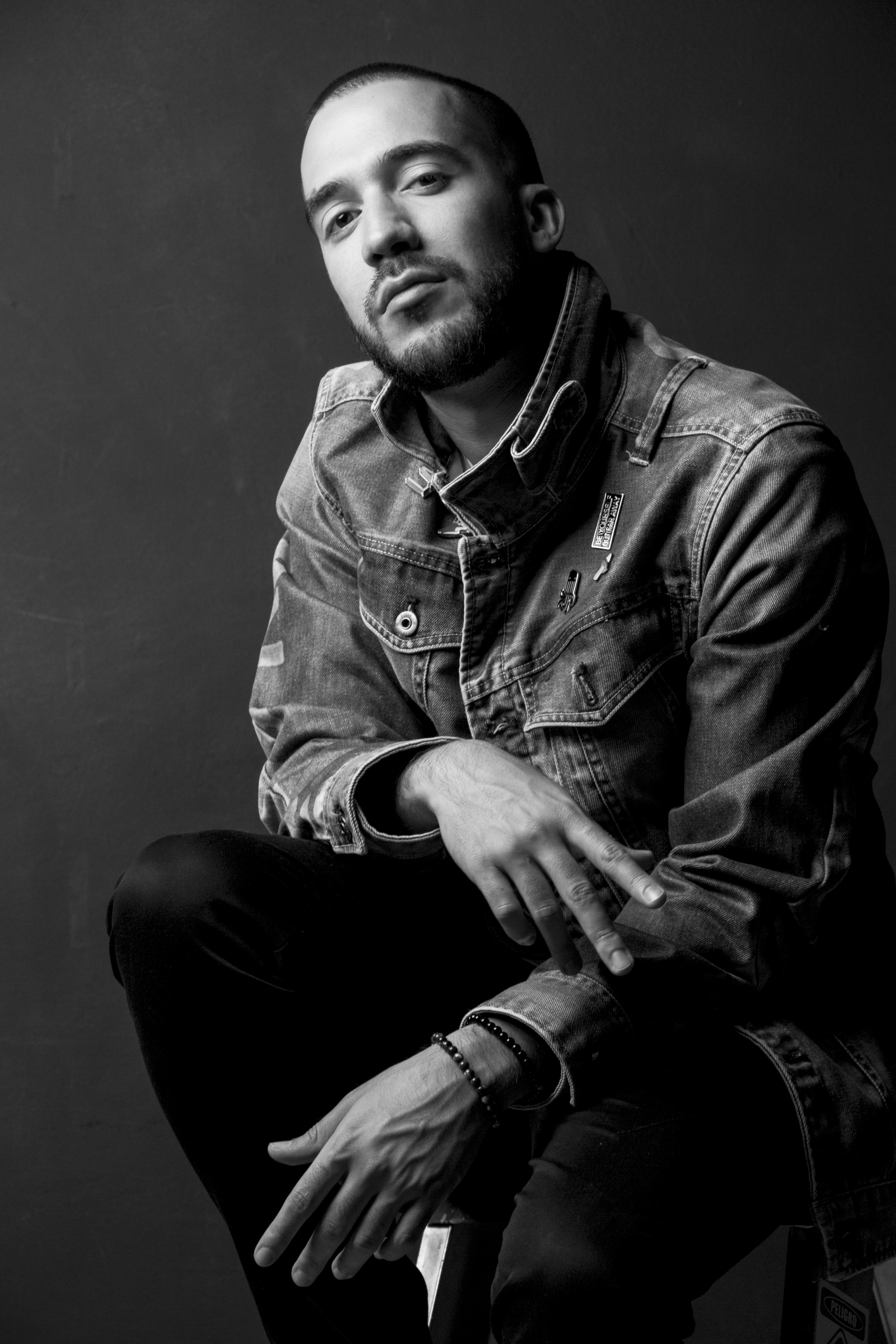 Bull ®